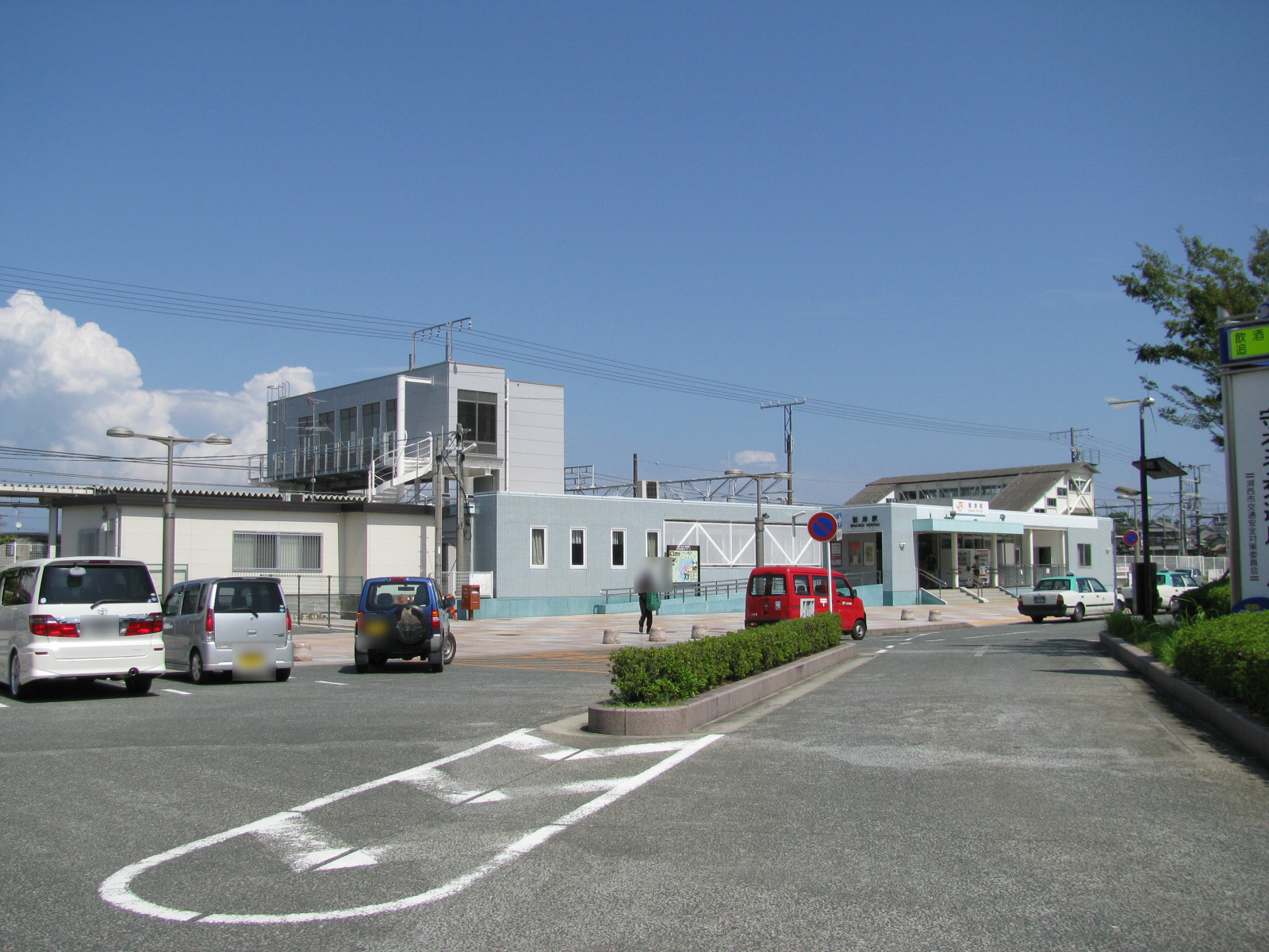 東海道本線鷲津駅